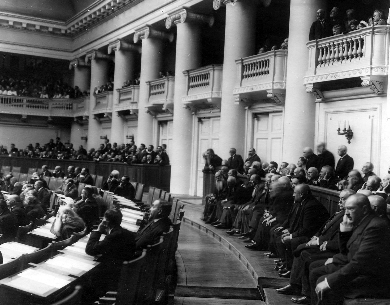 Четвертая Государственная Дума, 19 июля 1915 года: Думские депутаты в зале заседания Таврического дворца.